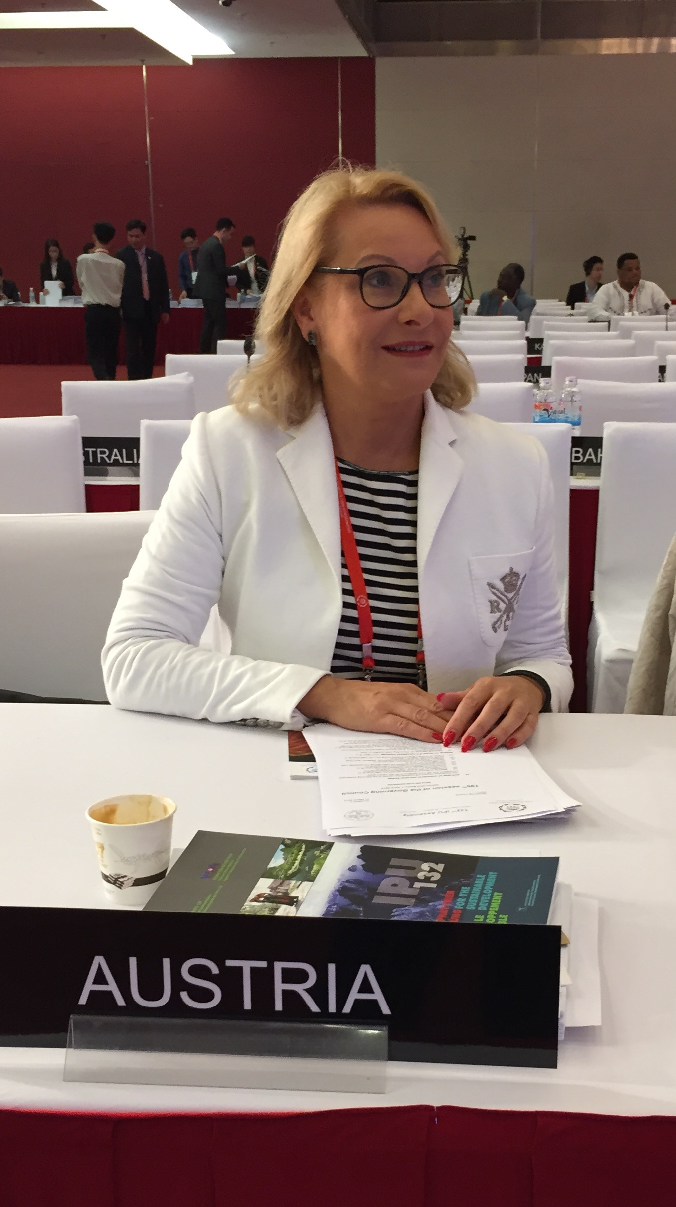 IPU 132 Hanoi